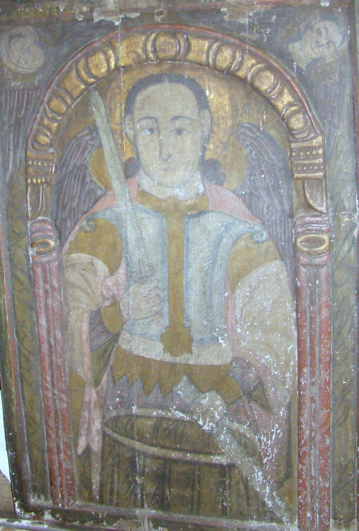 Biserica de lemn „Înălţarea Sfintei Cruci" din Pruneni